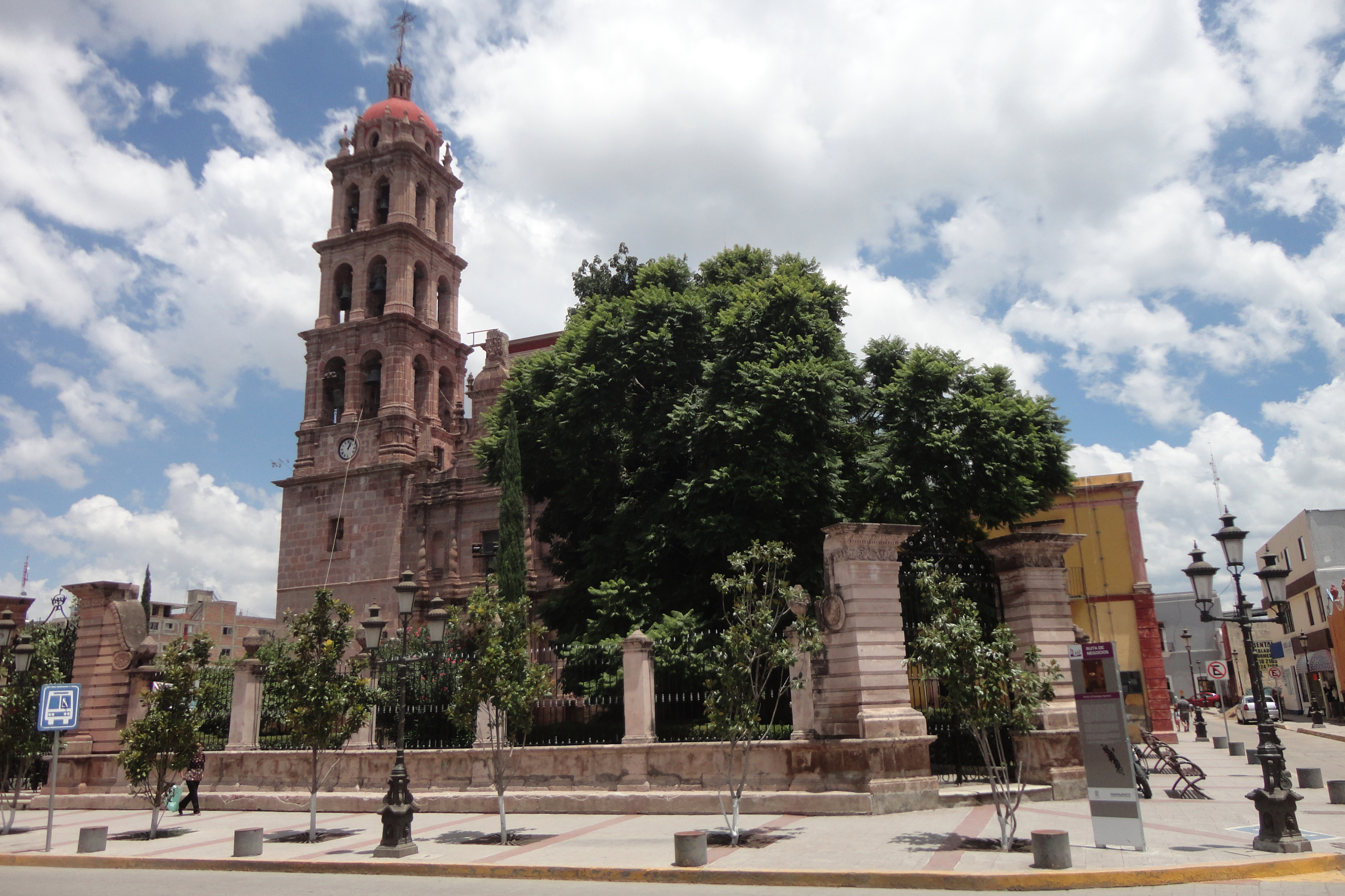 Parroquia de Santiago Apóstol - Silao, Guanajuato, México.